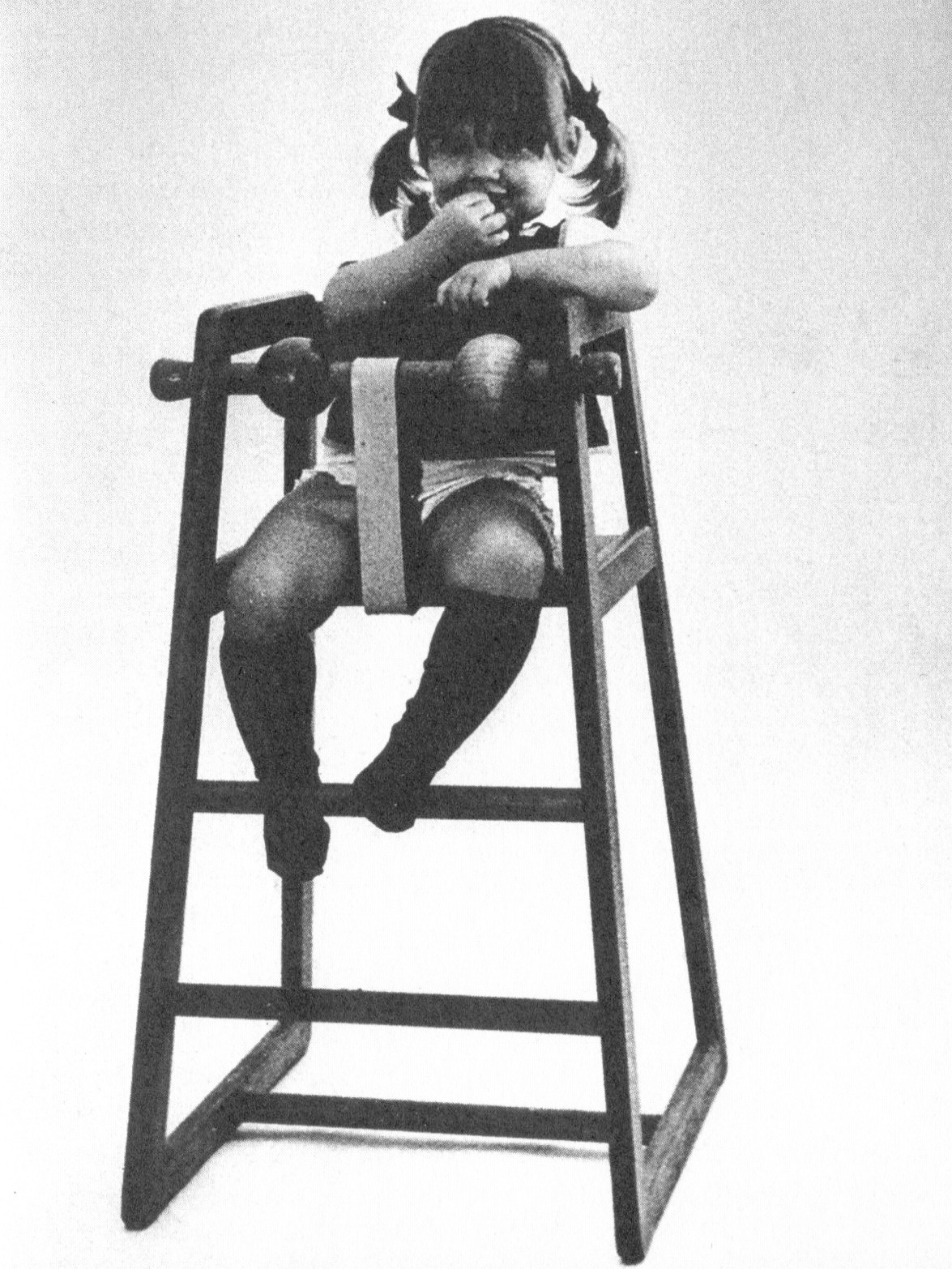 Stephan Gips barnstol"Robust"